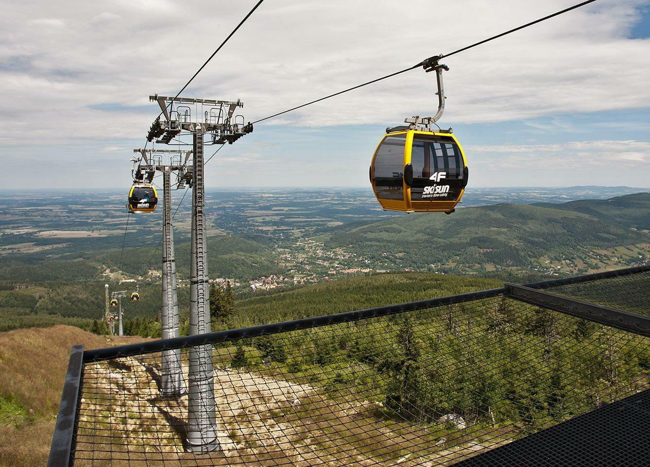 Wjazd wagoników na peron górnej stacji. Podziękowania dla pana z obsługi za umożliwienie wykonania tej fotki. Tak blisko nie wolno wchodzić.